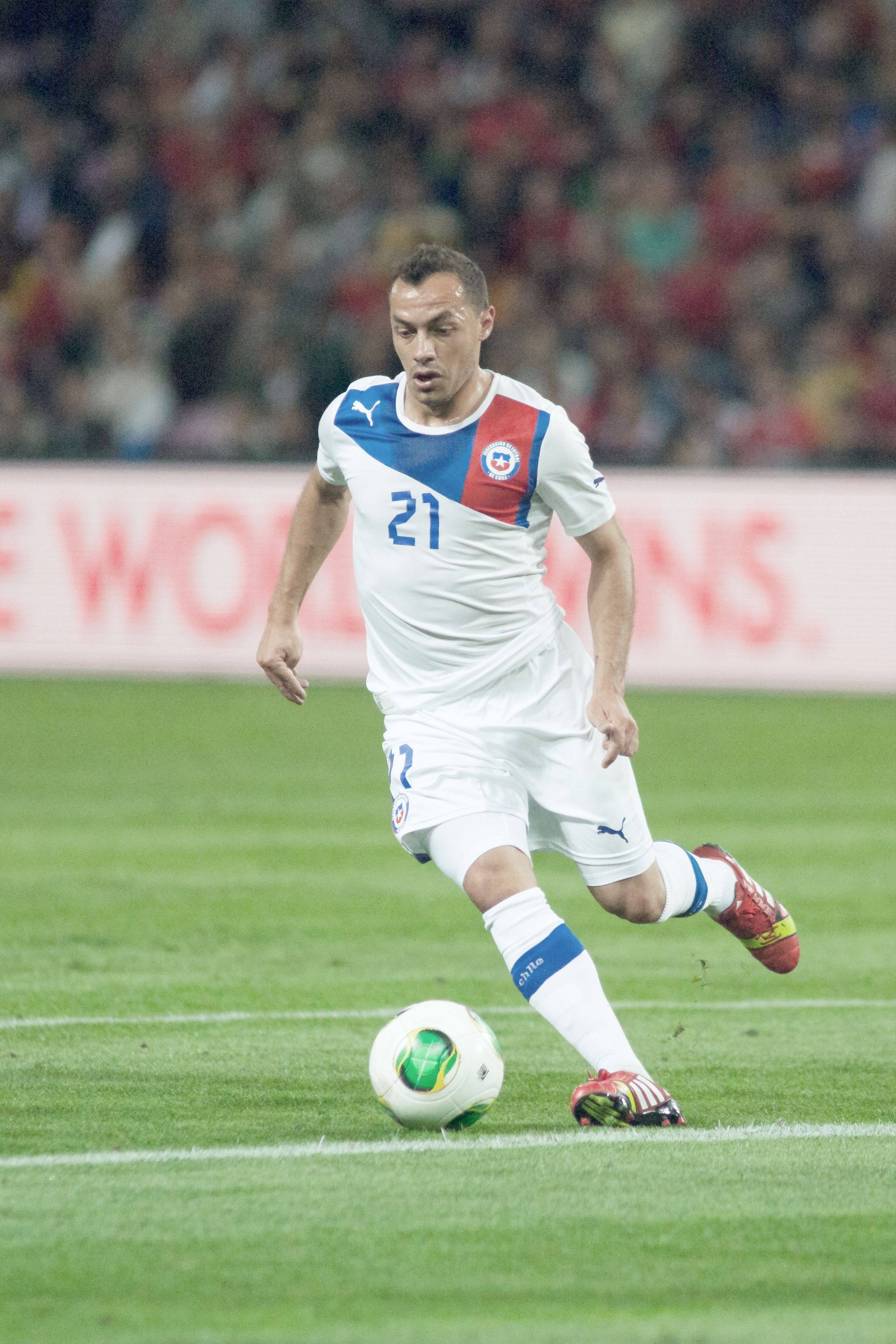 Espagne - Chili, 10 septembre 2013.